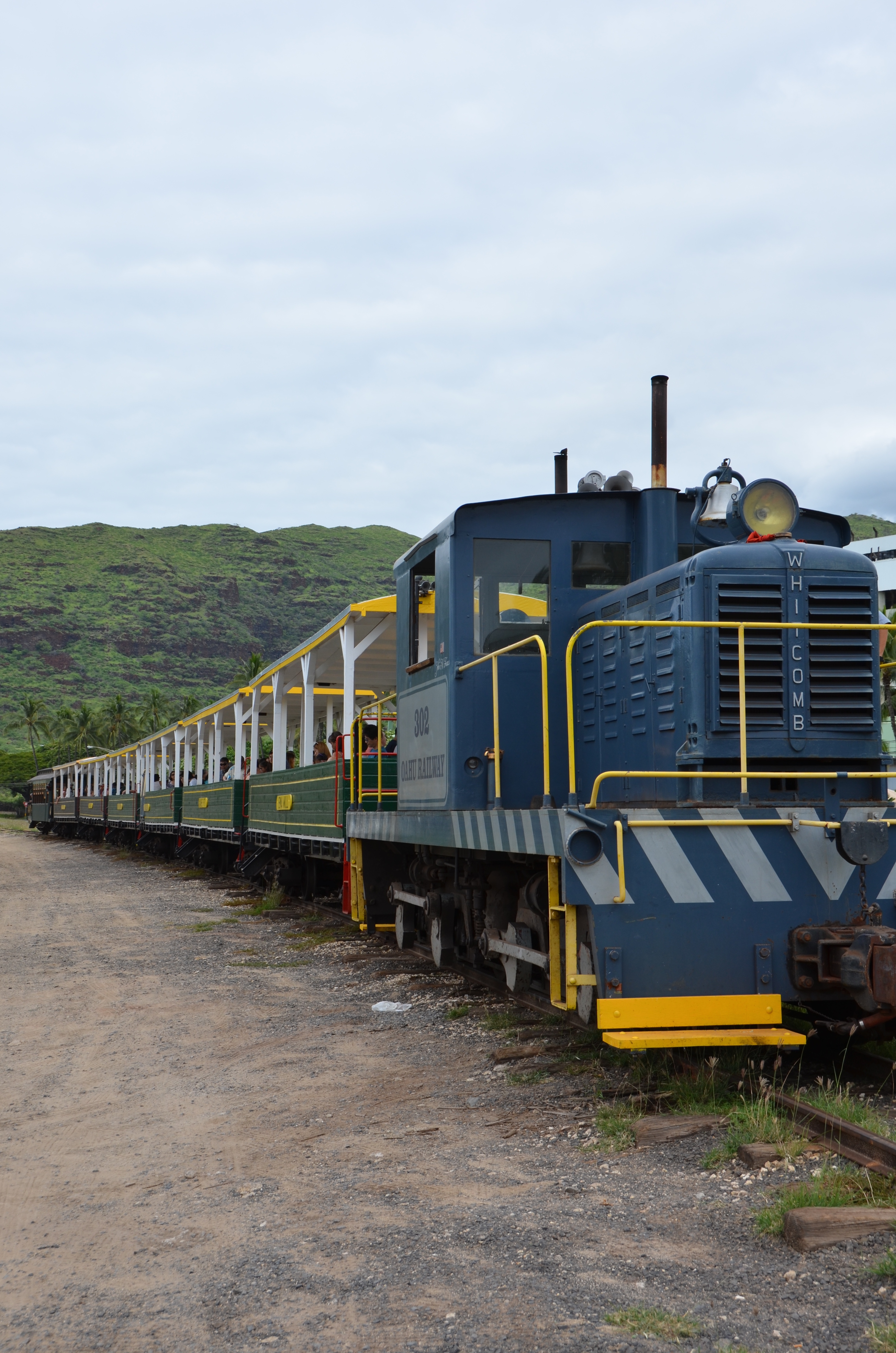 Hawaii Railway Tour